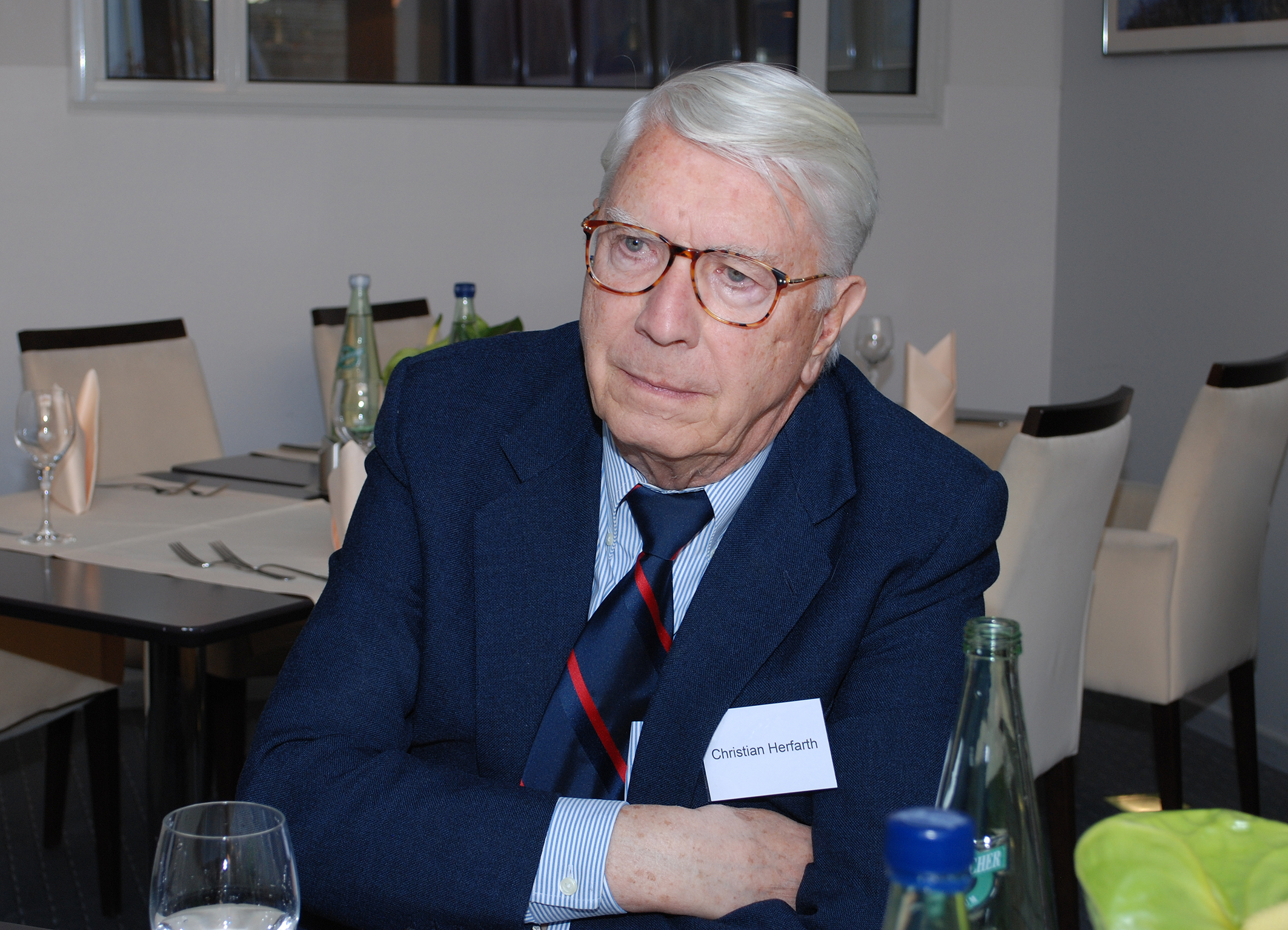 Prof. Dr. Christian Herfarth